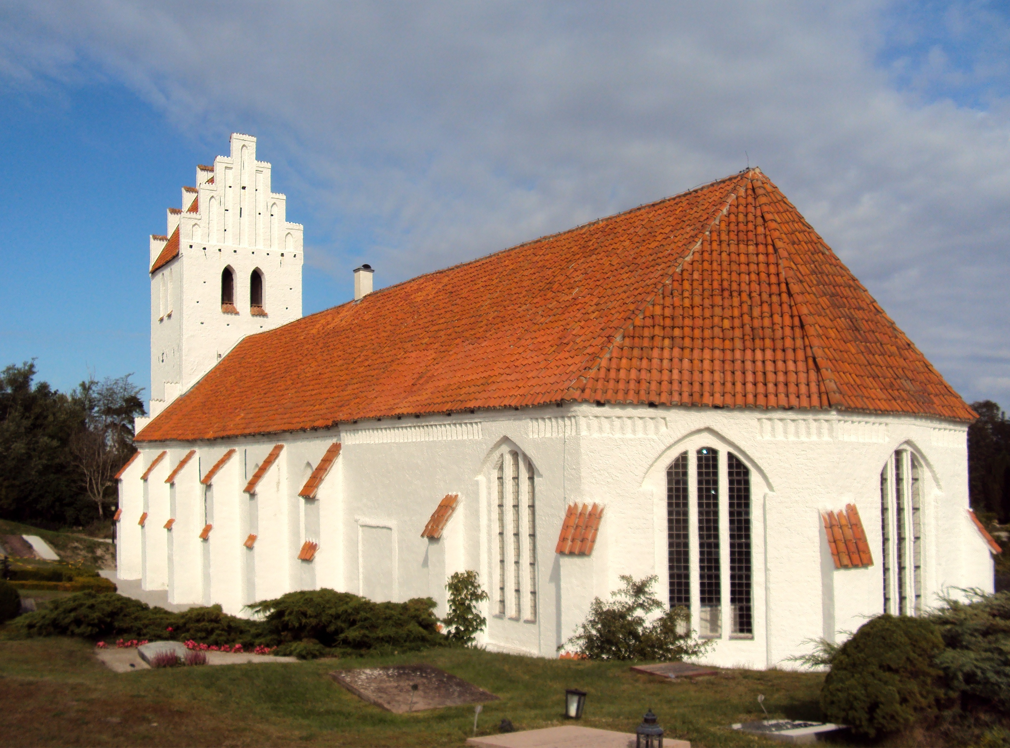 Falsterbo kyrka